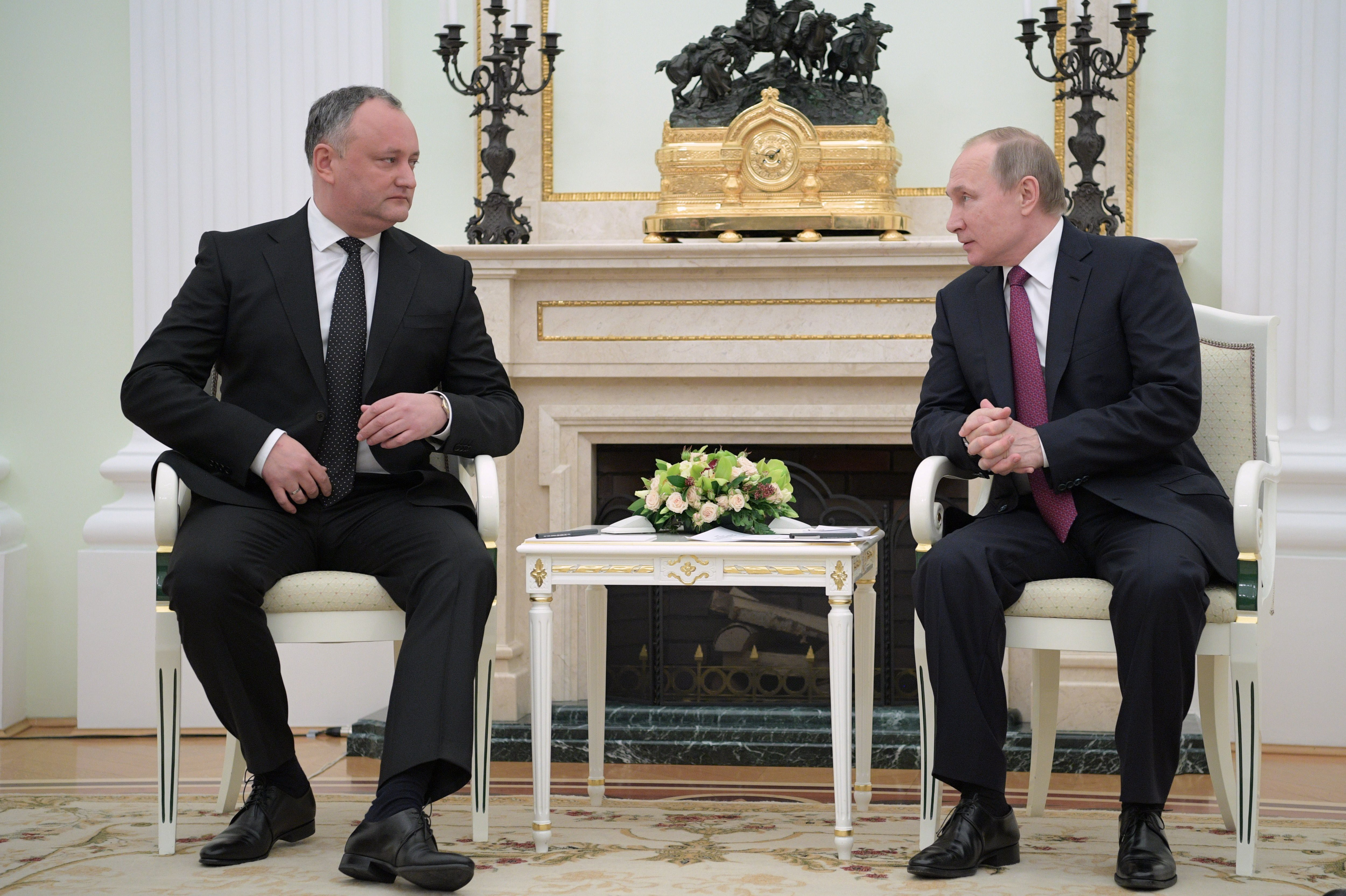 Президент России Владимир Путин с Президентом Молдовы Игорем Додоном во время переговоров